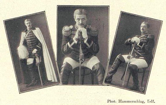 Schauspieler Georg Heinrich Schnell als Leibgardist (in "Der Leibgardist": Montag, den 15. Mai 1911; Komödie in 3 Aufzügen von Ferenc Molnár), Mai 1911, Bild in Düsseldorfer Theater-Woche, 2. Jahrg., Heft 41, 1911, Foto: Walter Lilienthal, von 1911 bis 1922 Photographisches Atelier Hammerschlag, Graf-Adolf-Straße 44, Düsseldorf